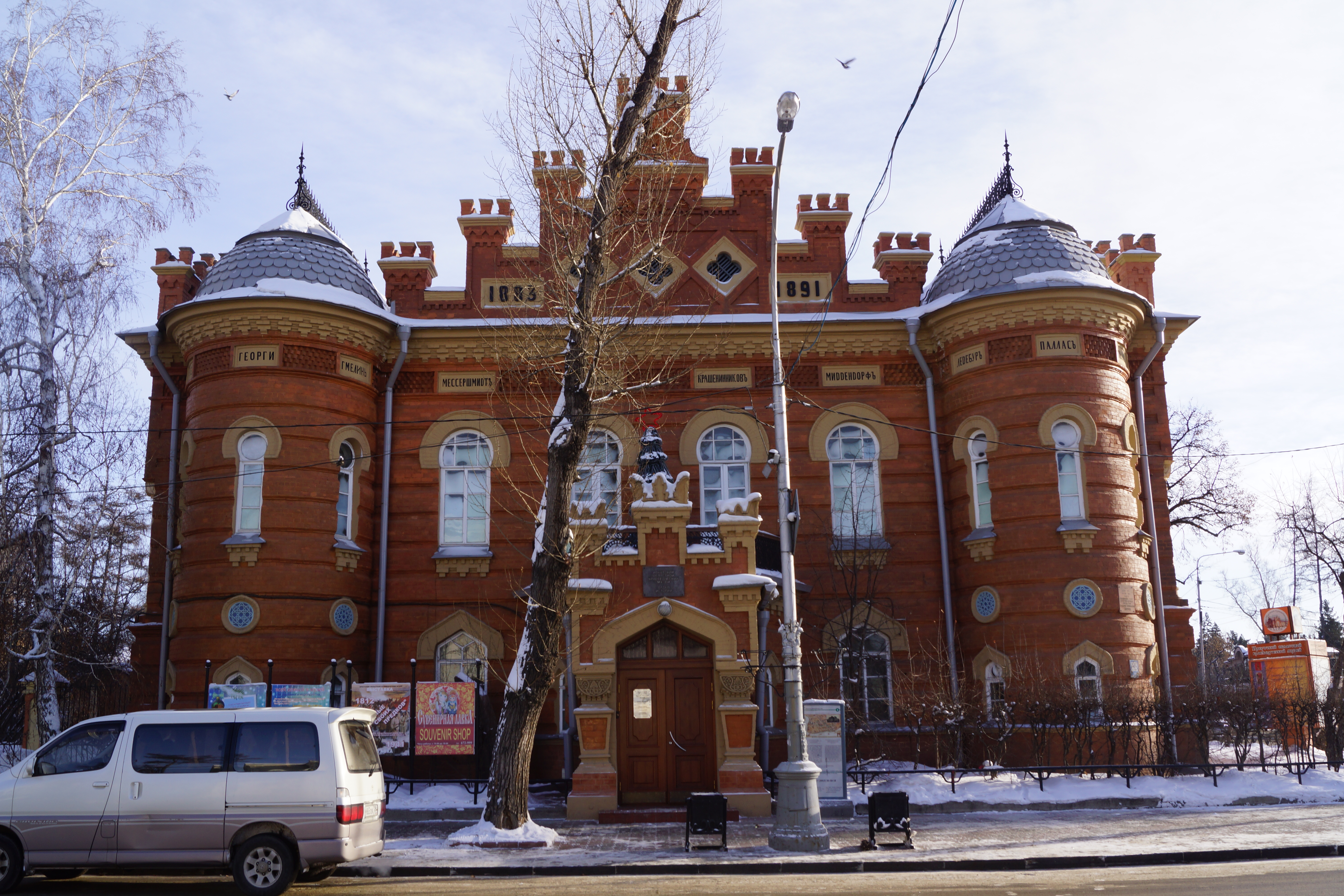 Музей Восточно-Сибирского Отдела Русского Географического Общества (ВСОРГО): улица Карла Маркса, 2 / бульвар Гагарина, 22, Иркутск, Иркутская область